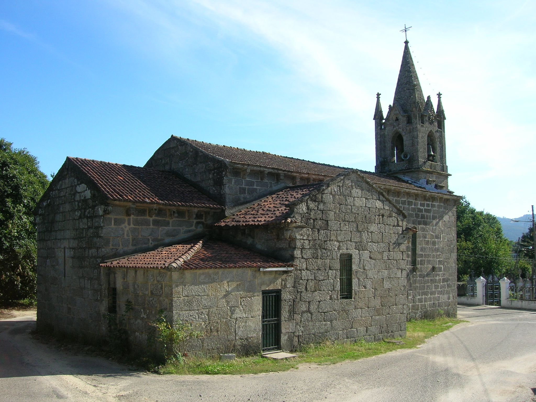 Iglesia de San Pedro de Angoares - Ponteareas - Pontevedra